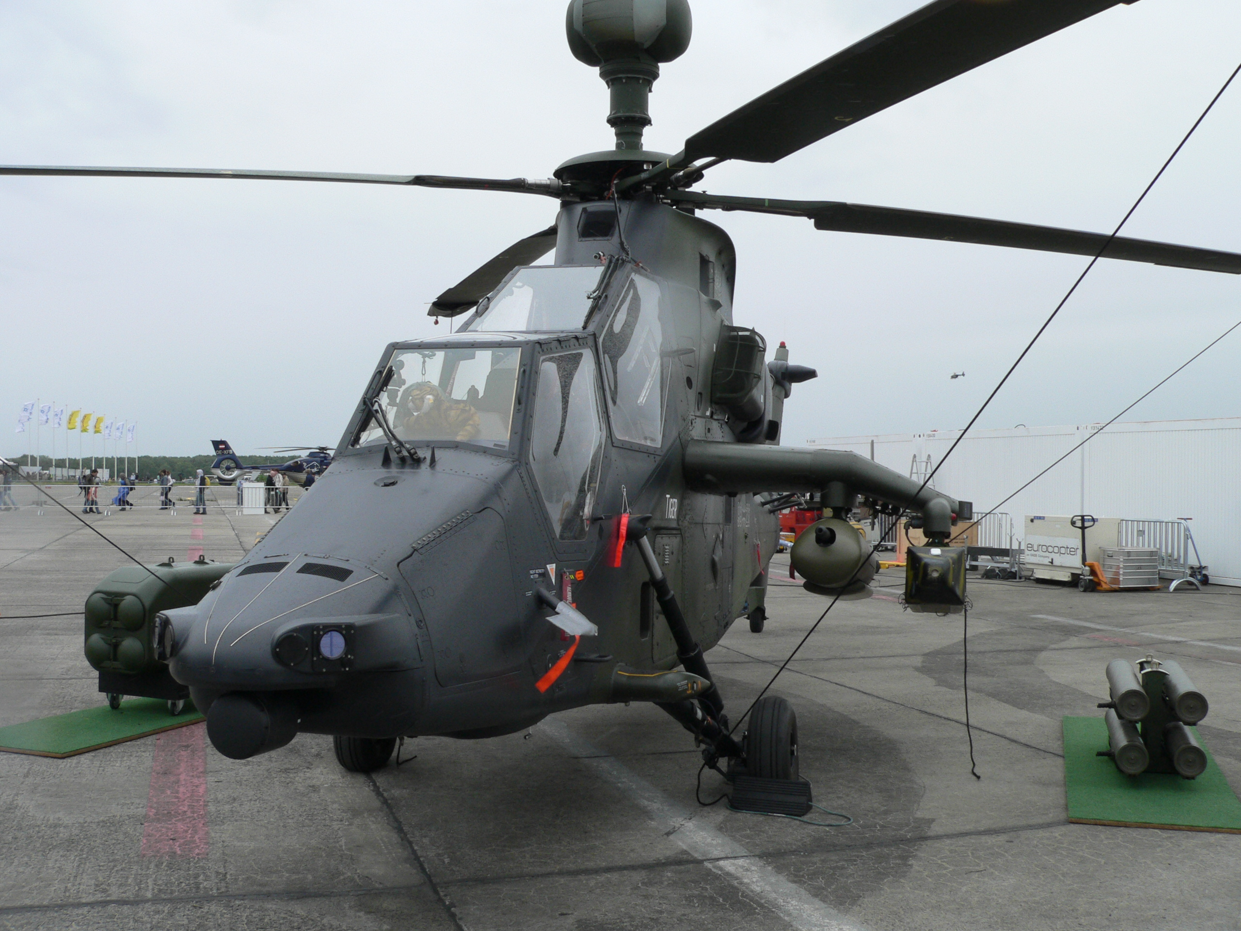 Eurocopter Tiger auf der ILA 2006. Am Boden auf der rechten Seite befindet sich der HOT3 - auf der linken Seite der Trigat LR-Startbehälter. Am Stummelflügel erkennt man einen 12,7mm MG Behälter und einen Elektronikbehälter für Test-Messungen.